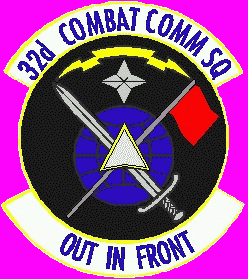 32d_Combat_Communications_Squadron